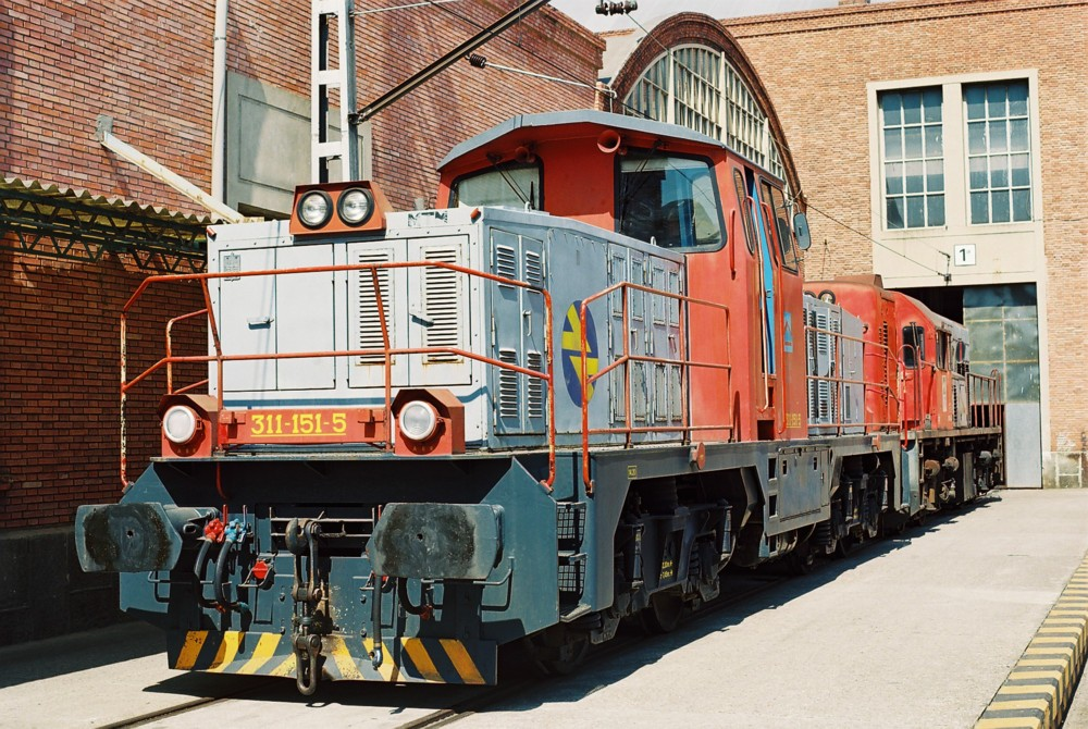 311-151-5 en Miranda del Ebro